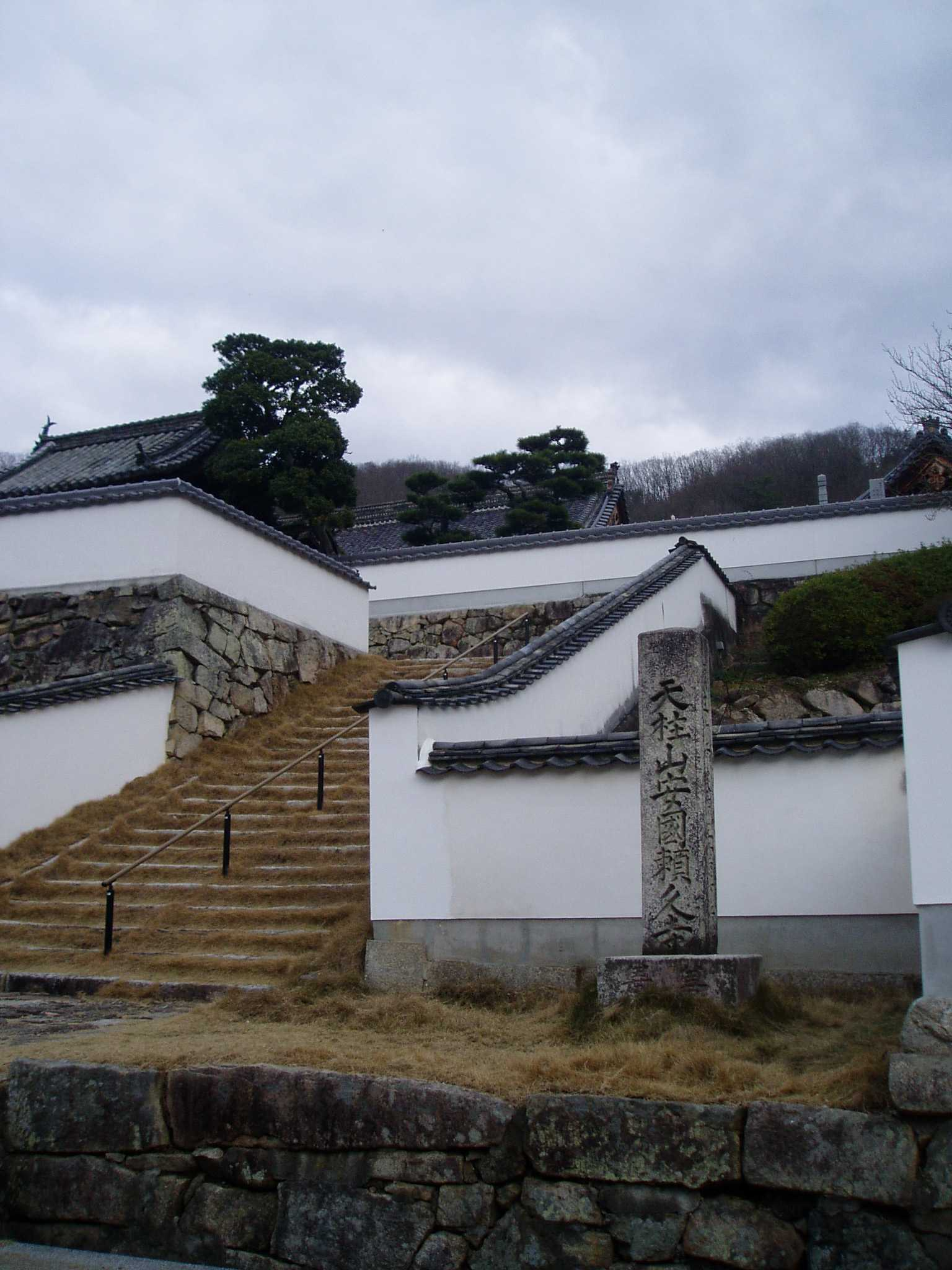 頼久寺(岡山県高梁市) 2007年1月4日撮影 撮影機材:OLYMPUS μ10 撮影者:Maechan0360